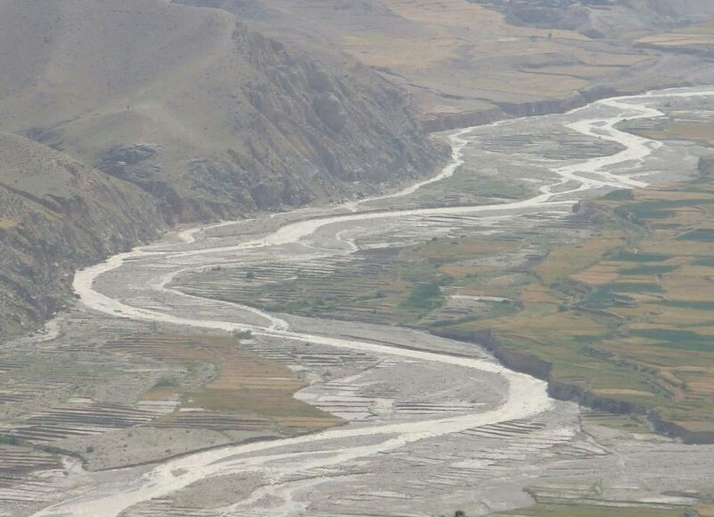 روستای منجوک- سرزمین گل محمد مدمیسایی - قهرمان ایل بهمئی در مبارزه